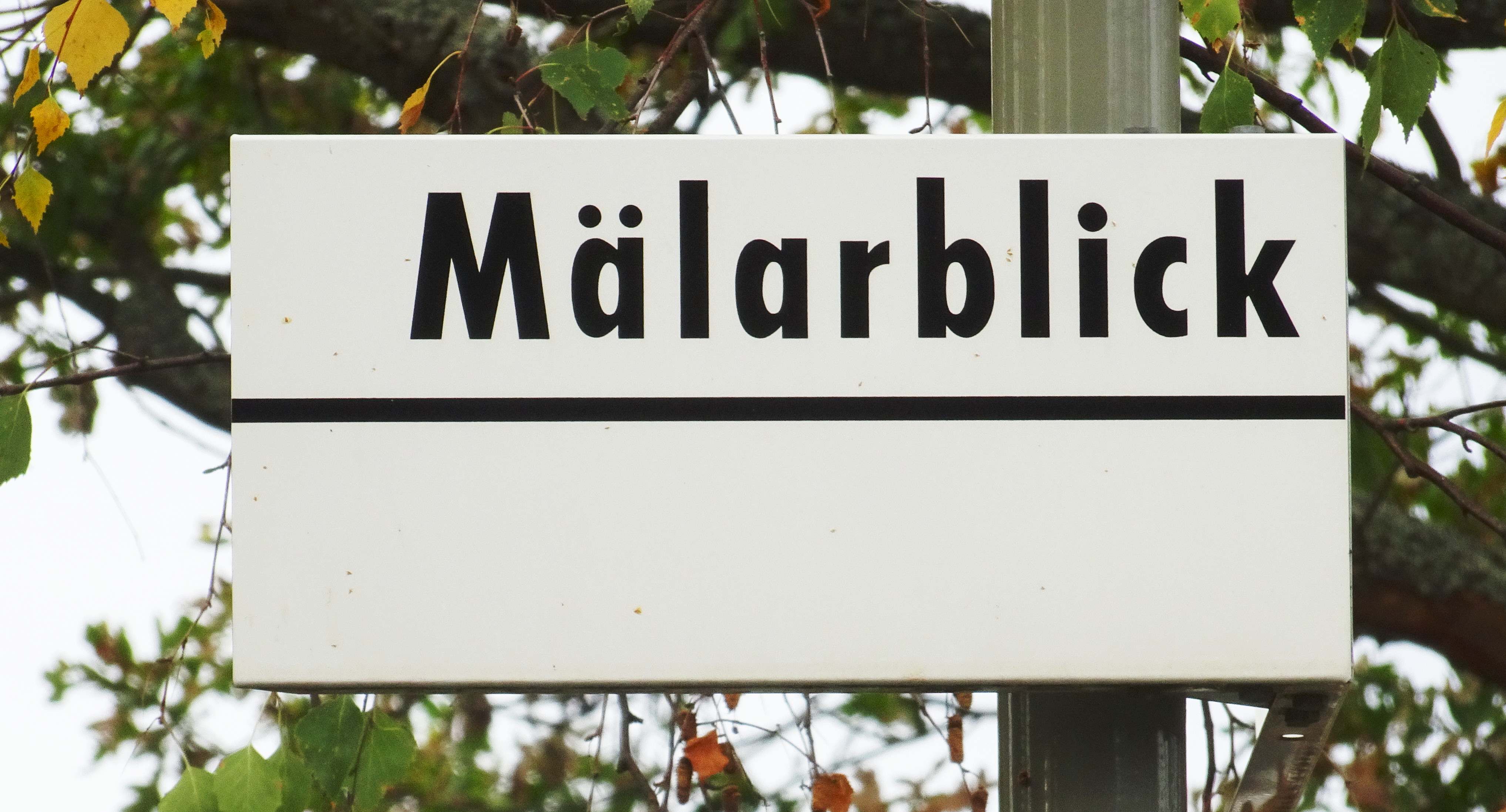 Radhusområdet och gatunamnet "Mälarblick" i Nockebyhov, arkitekt Gösta Nordin